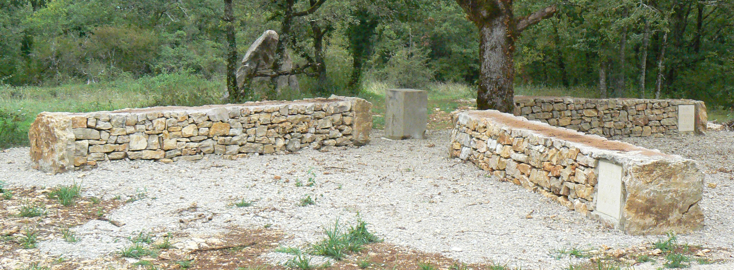 Pierre des Trois Régions située sur le site de la Pierre des Trois Êvêques